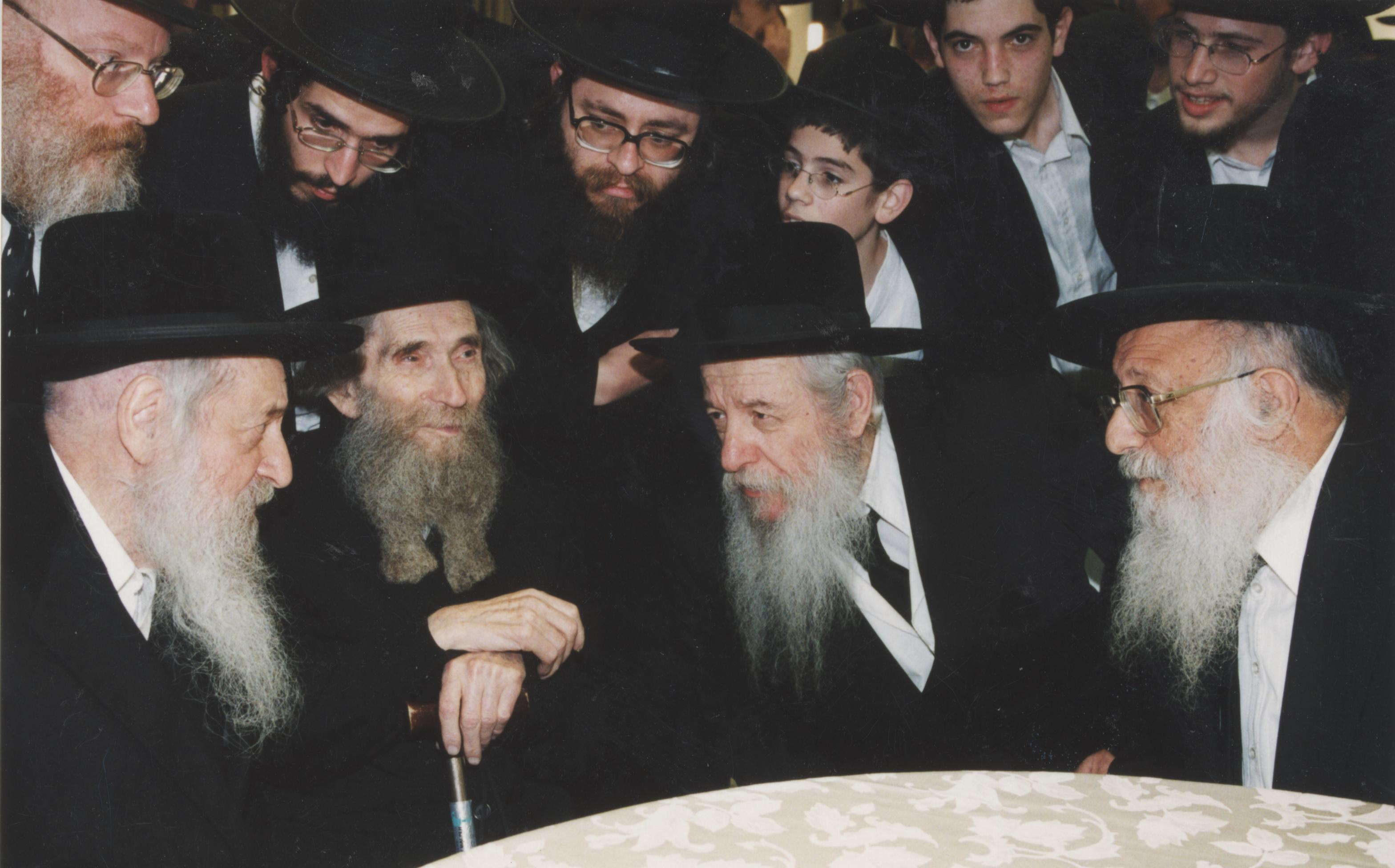 הרב שטיינמן עם הרב וואזנר